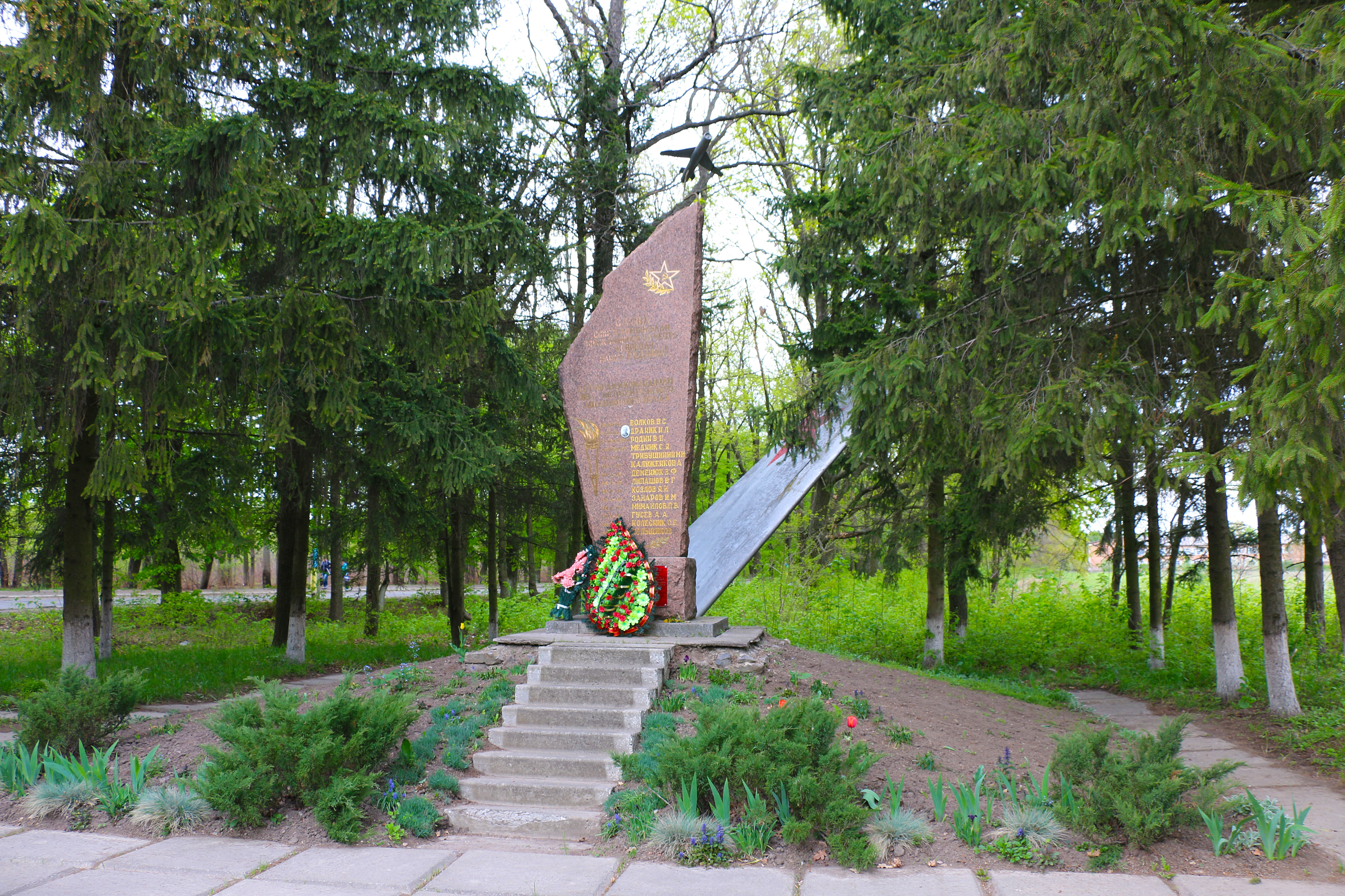 Пам'ятник на честь 14 загиблих воїнів 88-го винищувального авіаполку, Агрономічне, на автотрасі Вінниця-Тиврів